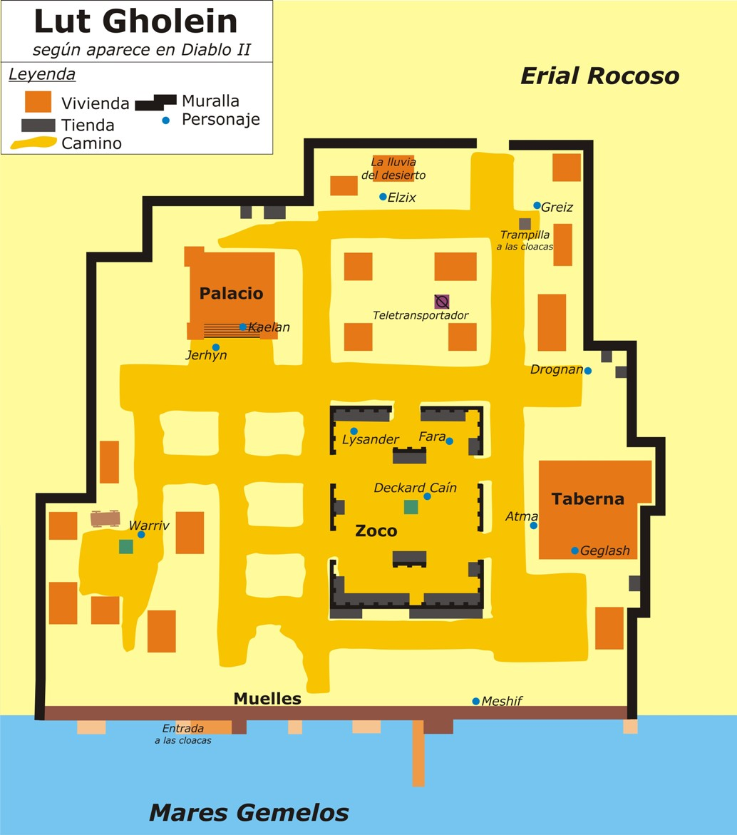 Mapa de Lut Gholein, ciudad ficticia del universo del videojuego Diablo, según aparece en el Acto II de Diablo II.